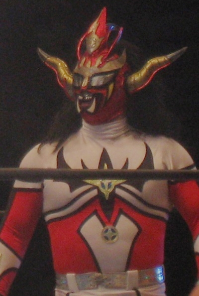 2014年2月11日 大阪府立総合体育館 「THE NEW BEGINNING in OSAKA」 獣神サンダー・ライガー